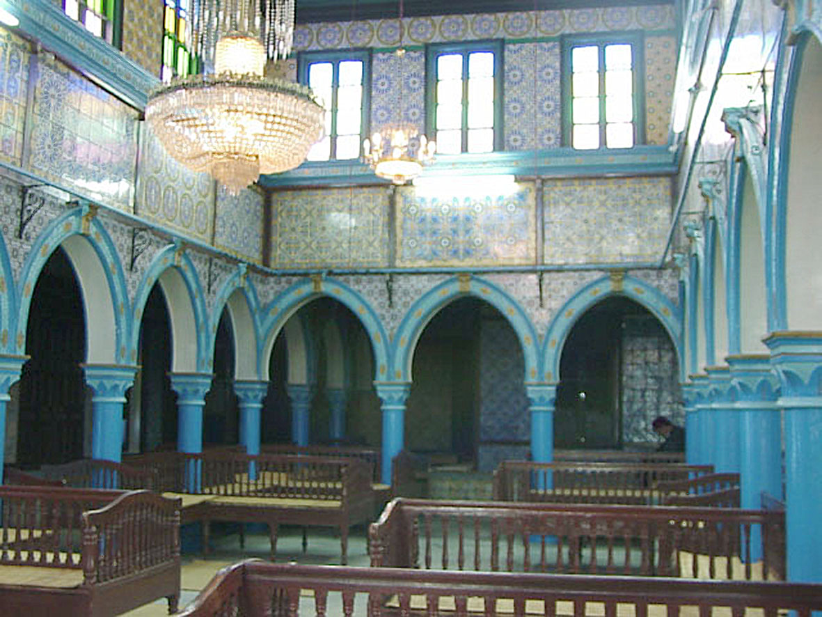 Djerba, Synagoge La Ghriba Jan 2002 Innenansicht 5